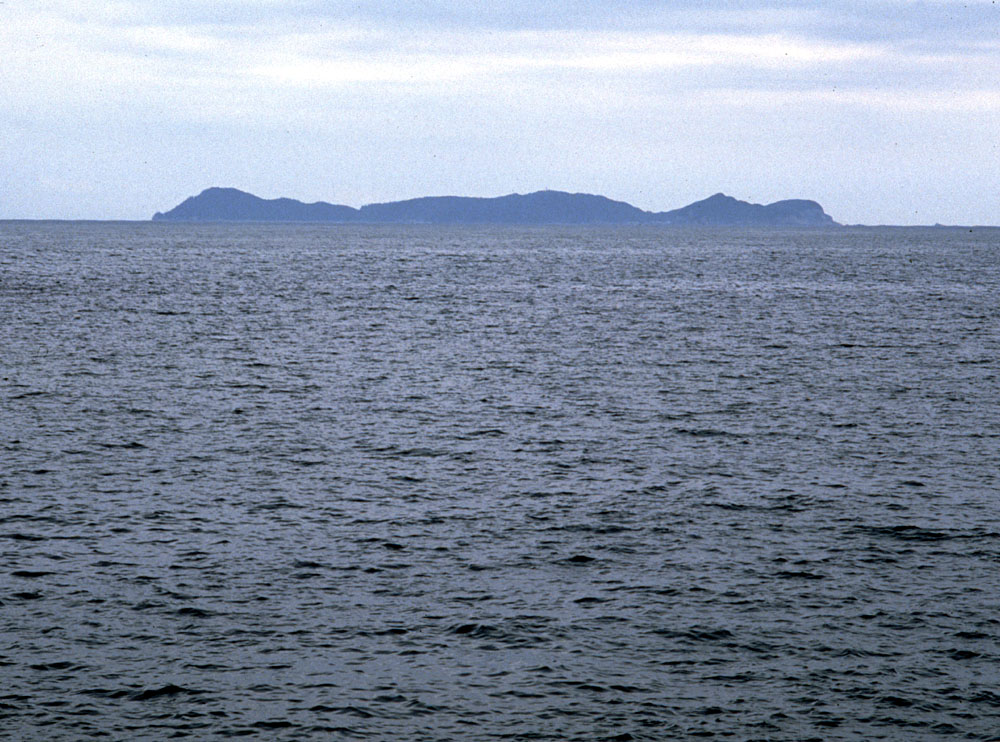 北ノ脇より伊島